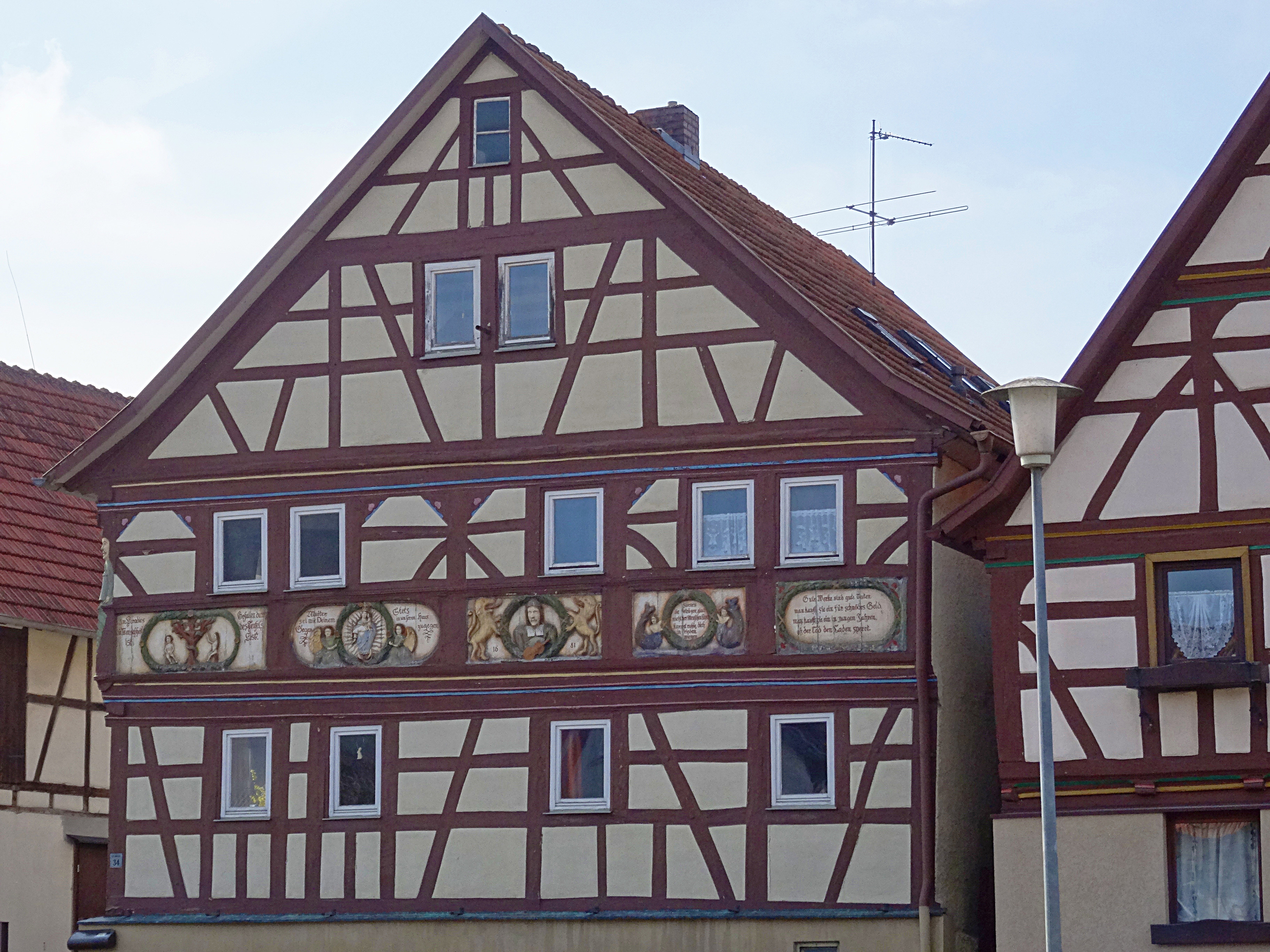 Fachwerk in der Alex-Hösel-Strasse 34, Ehemaliges Zehnthaus, Nordheim vor der Rhön